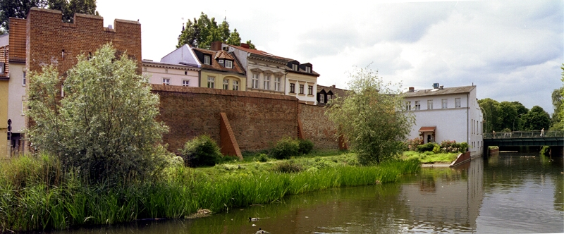 Panorama der Stadtmauer im Kolk in Berlin/Spandau.